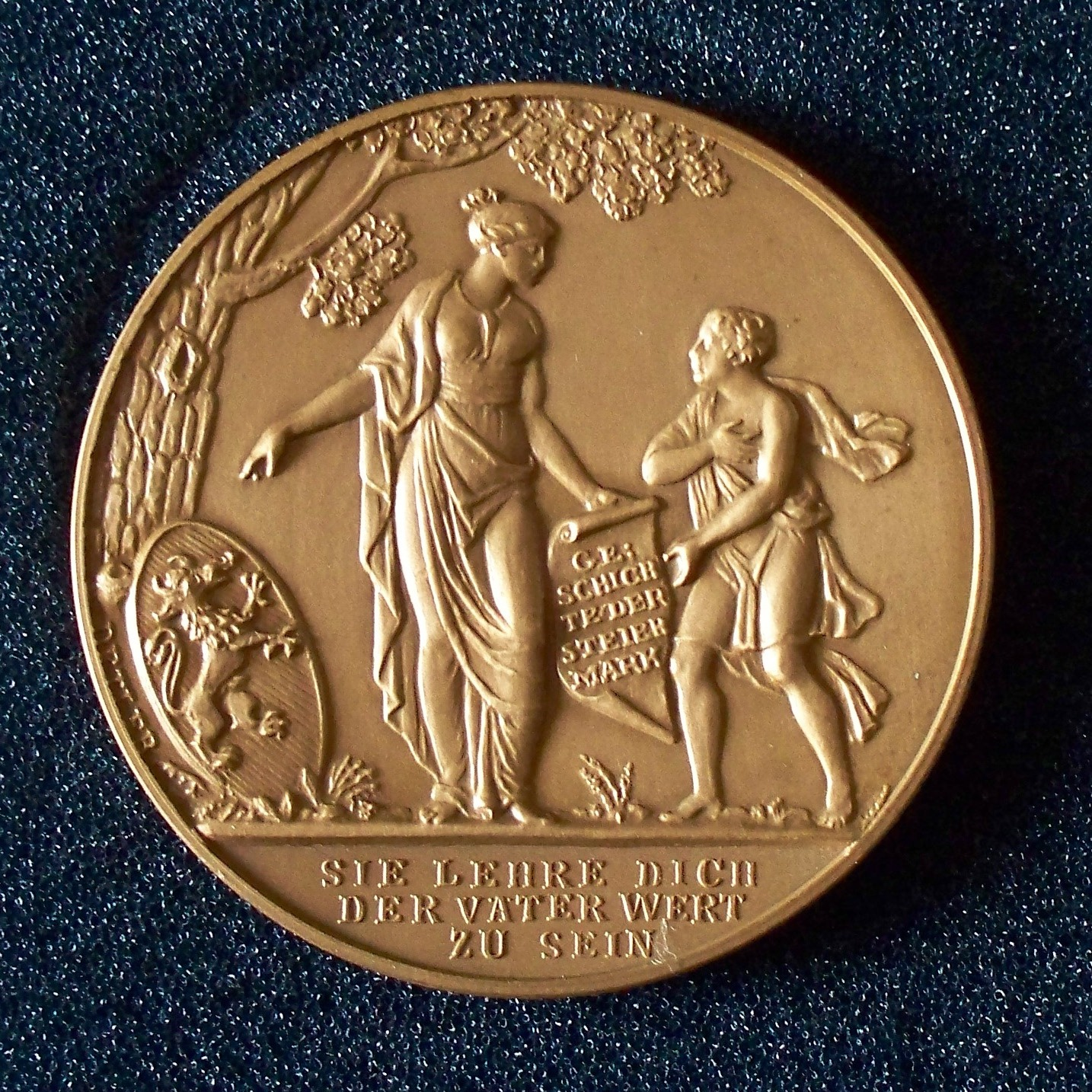 Wartinger Medaille (reverse)